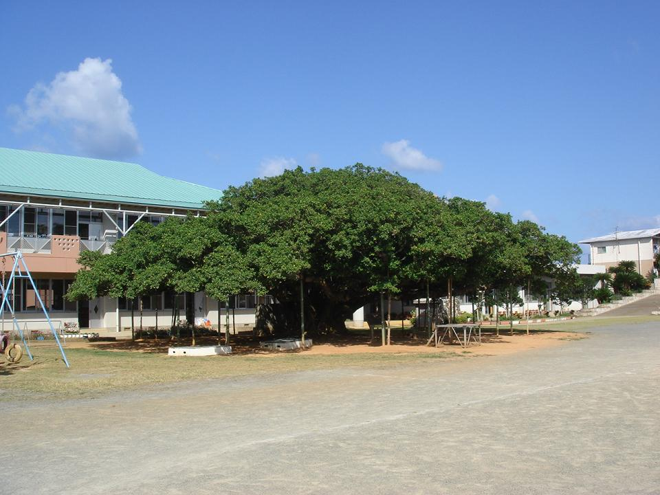 日本一のガジュマル（沖永良部島）（投稿者撮影）